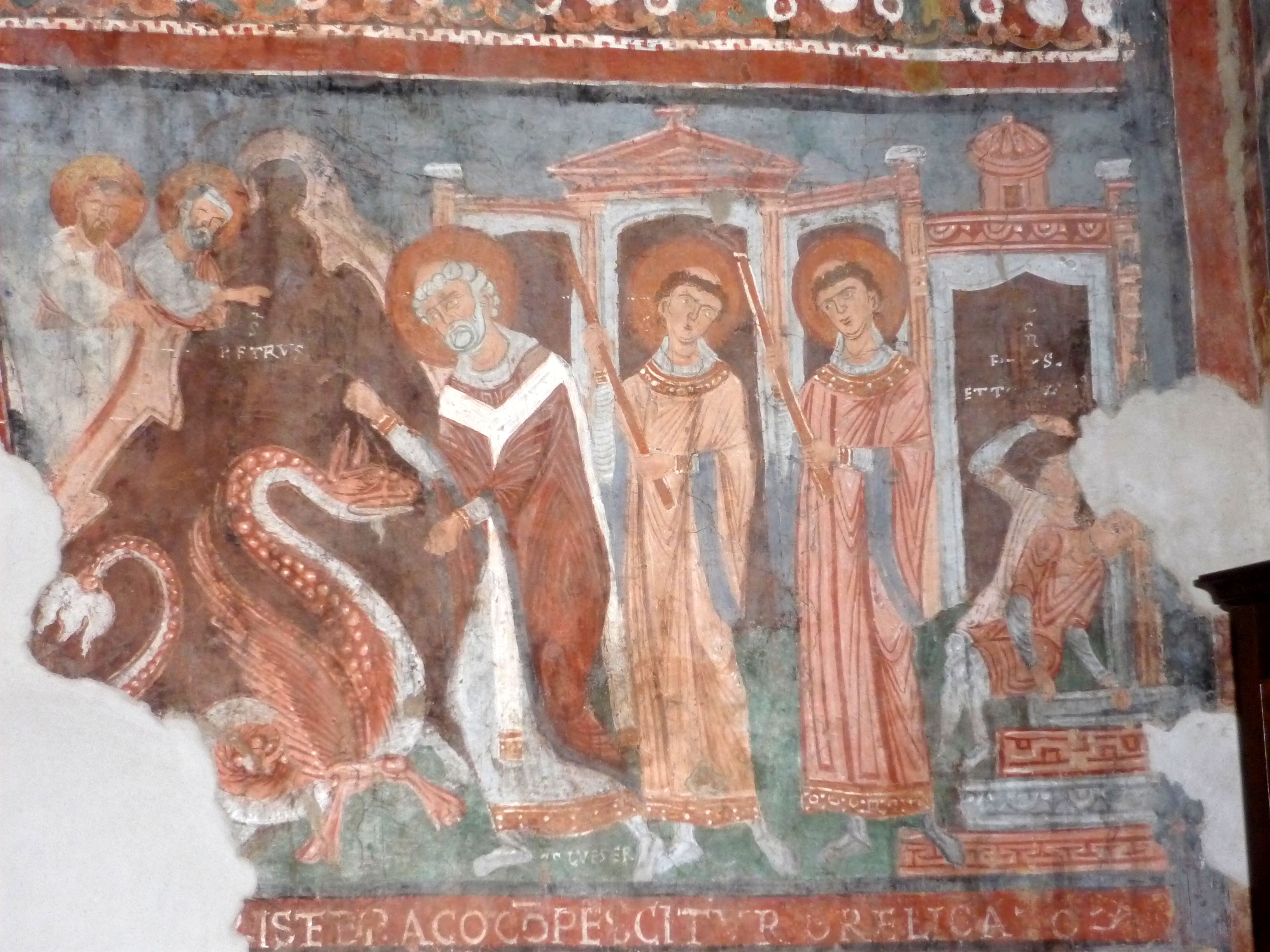 Affreschi di anonimo del XII secolo di scuola romana. Chiesa della Madonna di Ceri, presso Cerveteri.